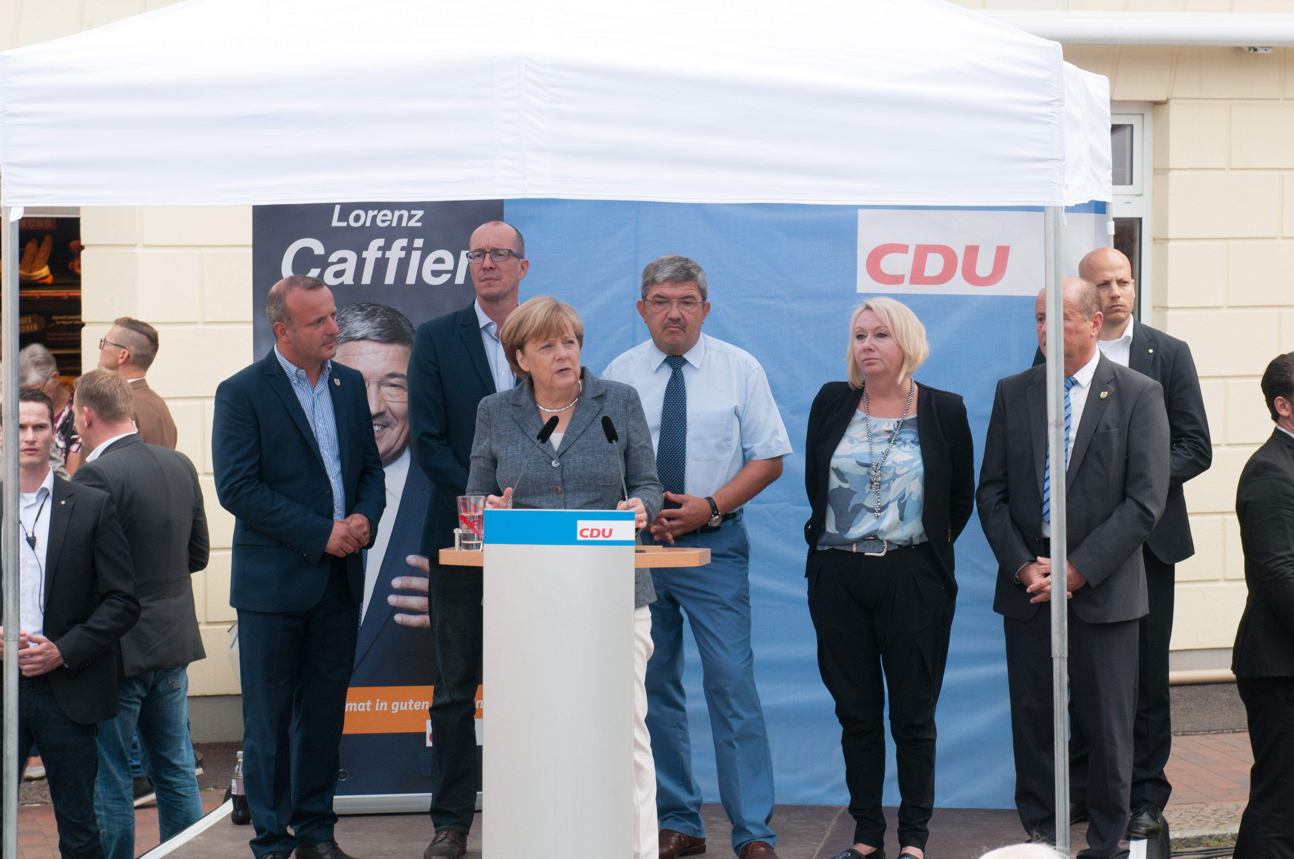 Wahlkampfabschluss der CDU in Bad Doberan am 3. September 2016